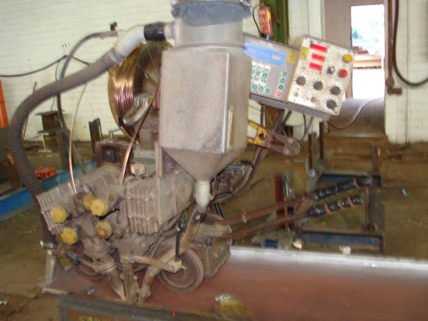 Máquina de soldar de gran capacidad